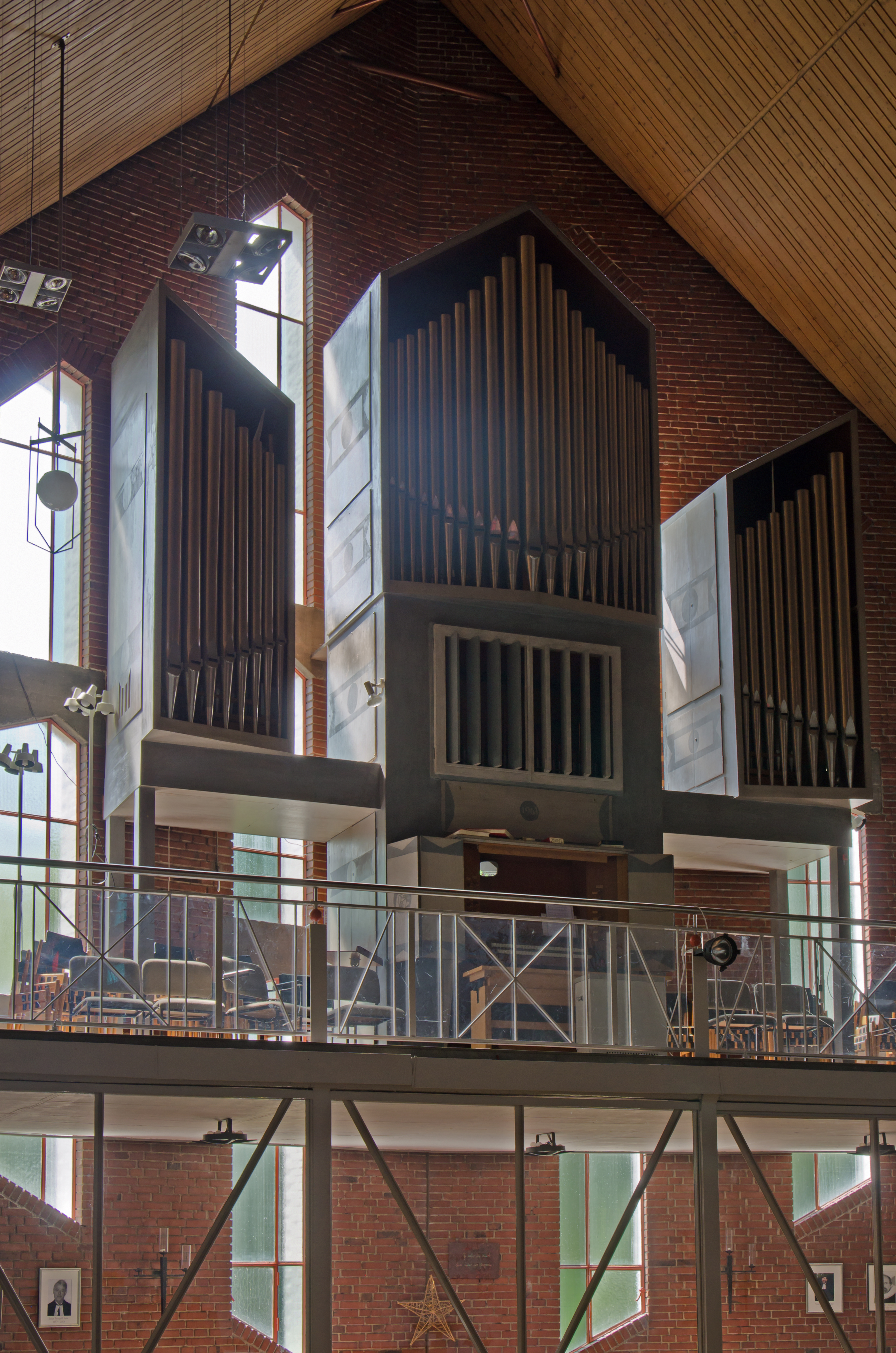 Rahlstedt St.Martin Orgel